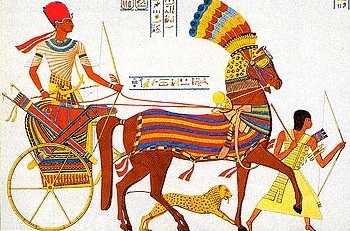 Dieses Bild zeigt einen Pharao mit der Krone Unterägyptens, der alleine auf einem hethitischen Streitwagen steht. An seiner Seite ist ein angreifender Gepard dargestellt. Ob der Gepard im Kampf wirklich aktiv angegriffen hat, ist jedoch fragwürdig. Vor dem Streitwagen läuft ein Infanterist mit einem Langbogen in der linken Hand und einem Pfeil in der rechten Hand. Eine andere Version des gleichen Bildes 150px